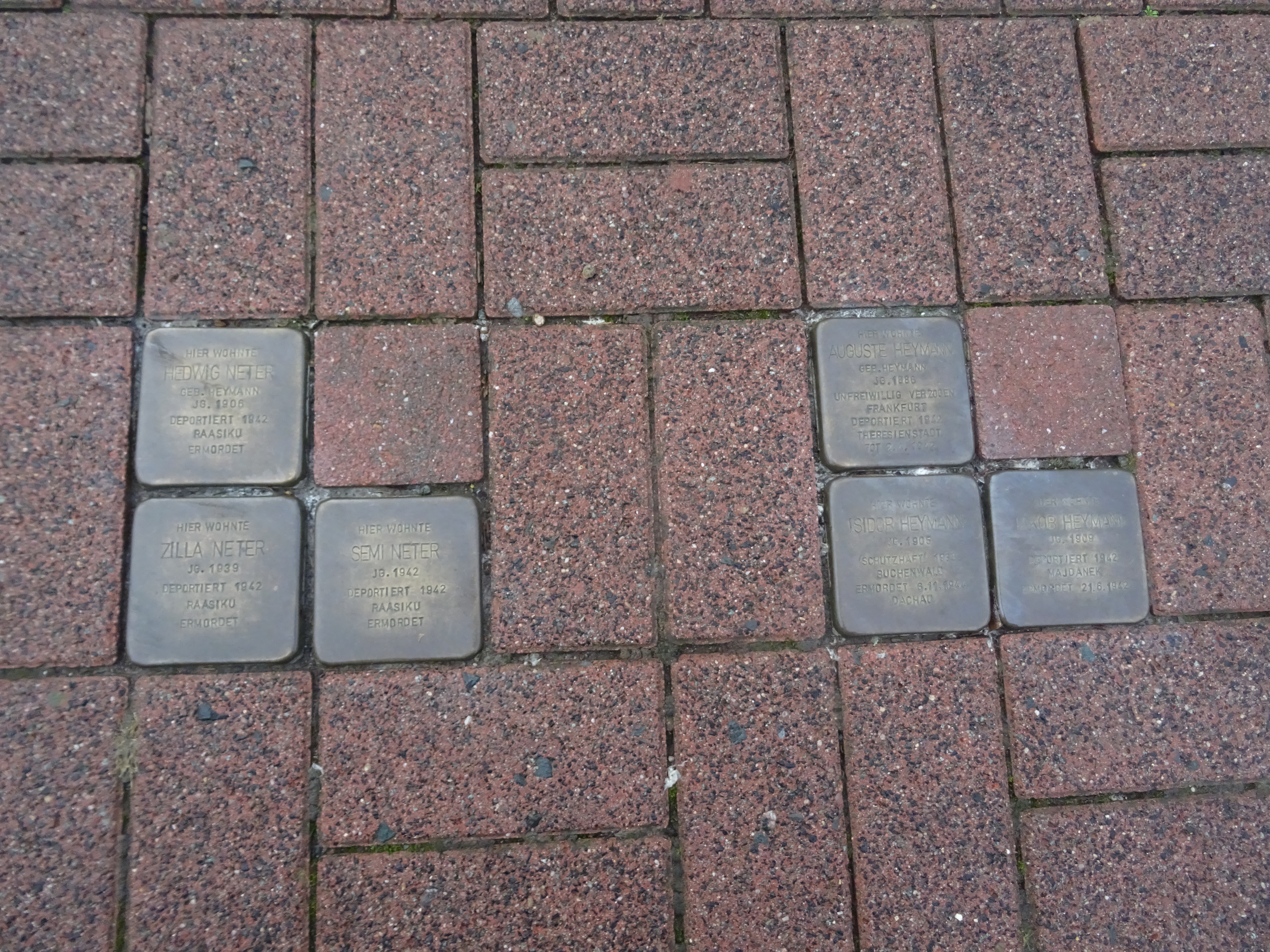 Stolpersteine Biskirchen Dorfplatz